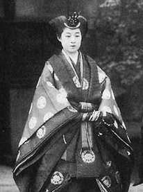 昭和5年（1930年）2月4日、高松宮宣仁親王と喜久子妃の婚儀より。